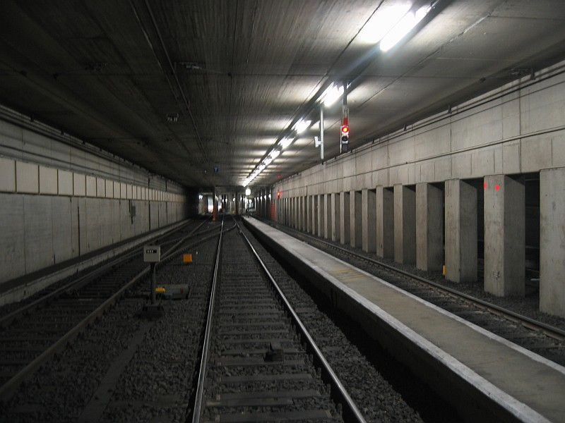 Wendeanlage Seckbacher Landstrasse der U-Bahn Frankfurt in Richtung Bahnsteig aufgenommen. Anlage hat in die andere Richtung ungefähr nochmal die gleiche Länge.